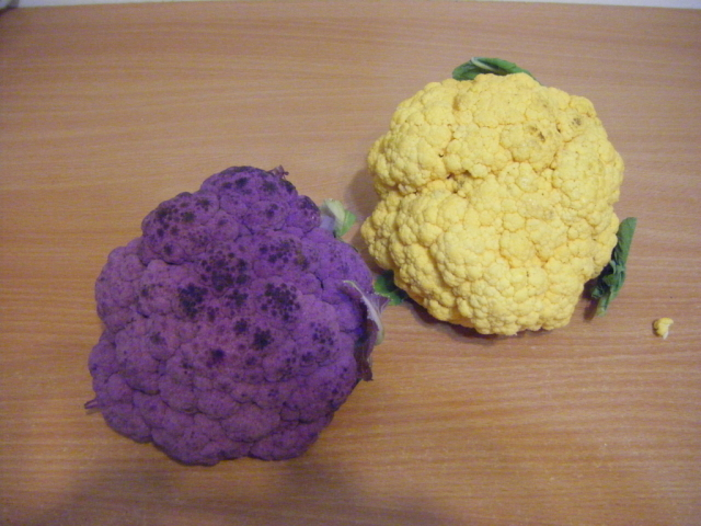 choux fleur coloré orange et violet